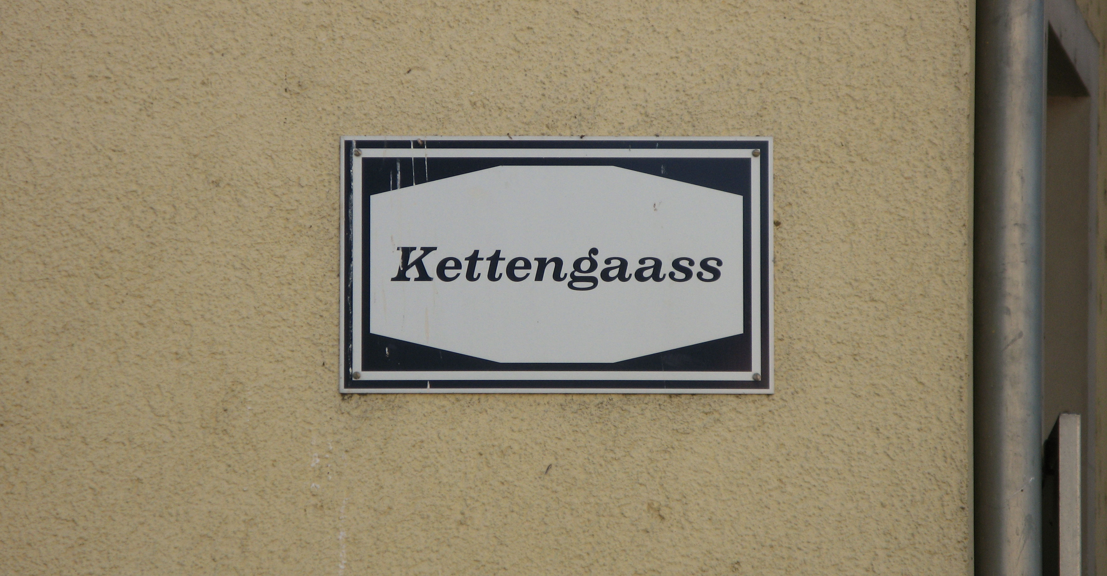 Eifeler zu Duelem.